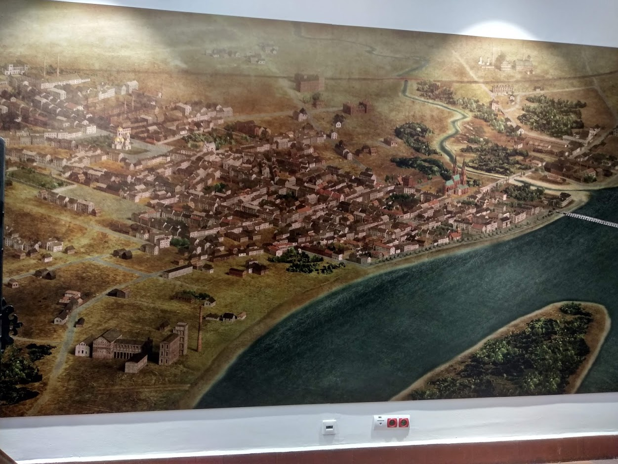 Muzeum Historii Włocławka (2019 r.)